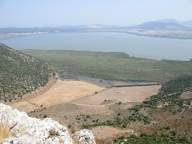 Η λίμνη Βουλκαριά φωτογραφημένη από το κάστρο της αρχαίας Παλαίρου.